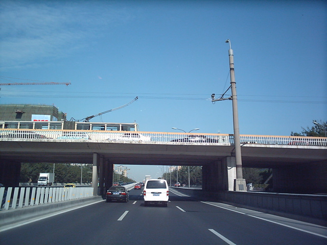 2nd Ring Road (Beijing) at Chaoyangmen. DF08 (English) 2004 image.